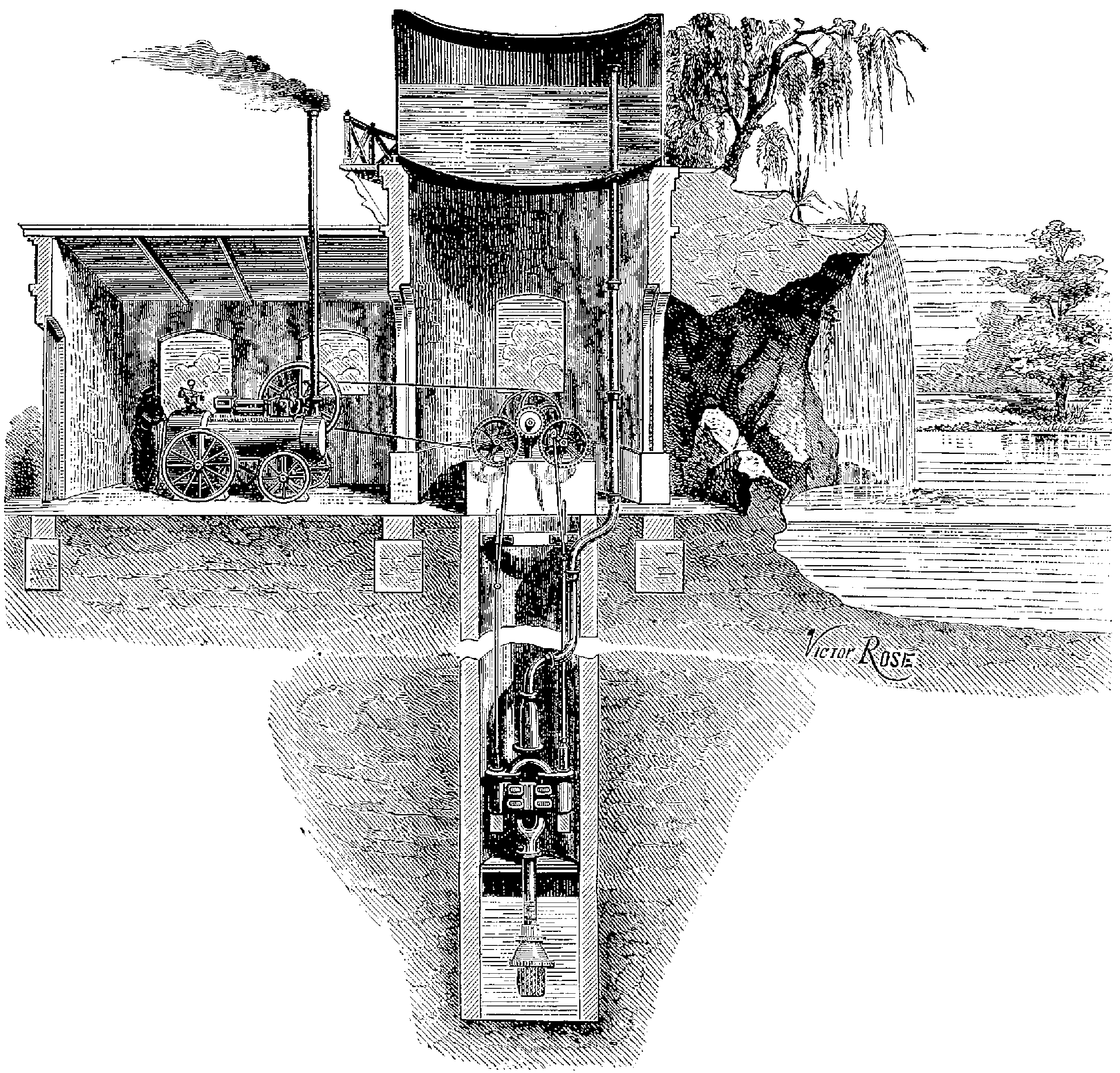 Locomobile de MM. Chaligny et Guyot-Sionnest, actionnant un jeu de pompes à piston